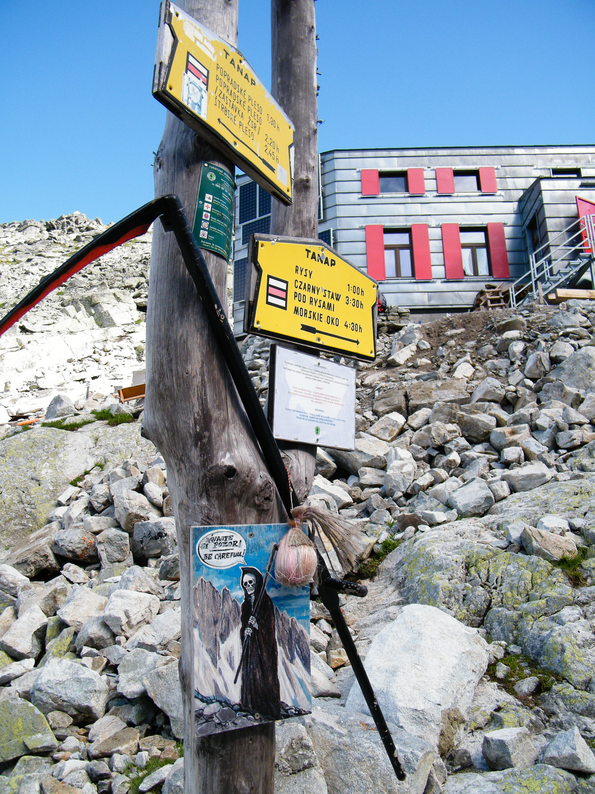 Hunfalvy-hágó alatti menedékház, Szlovákia